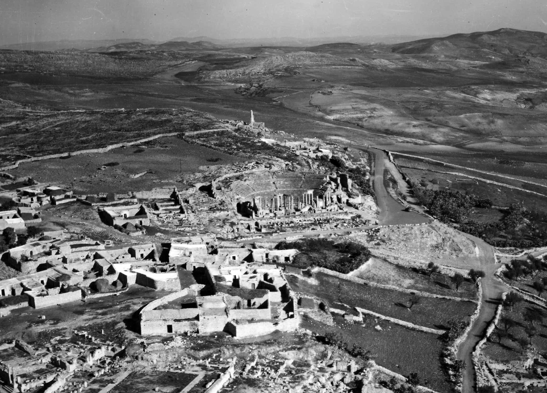 Dougga Vue aérienne du théâtre